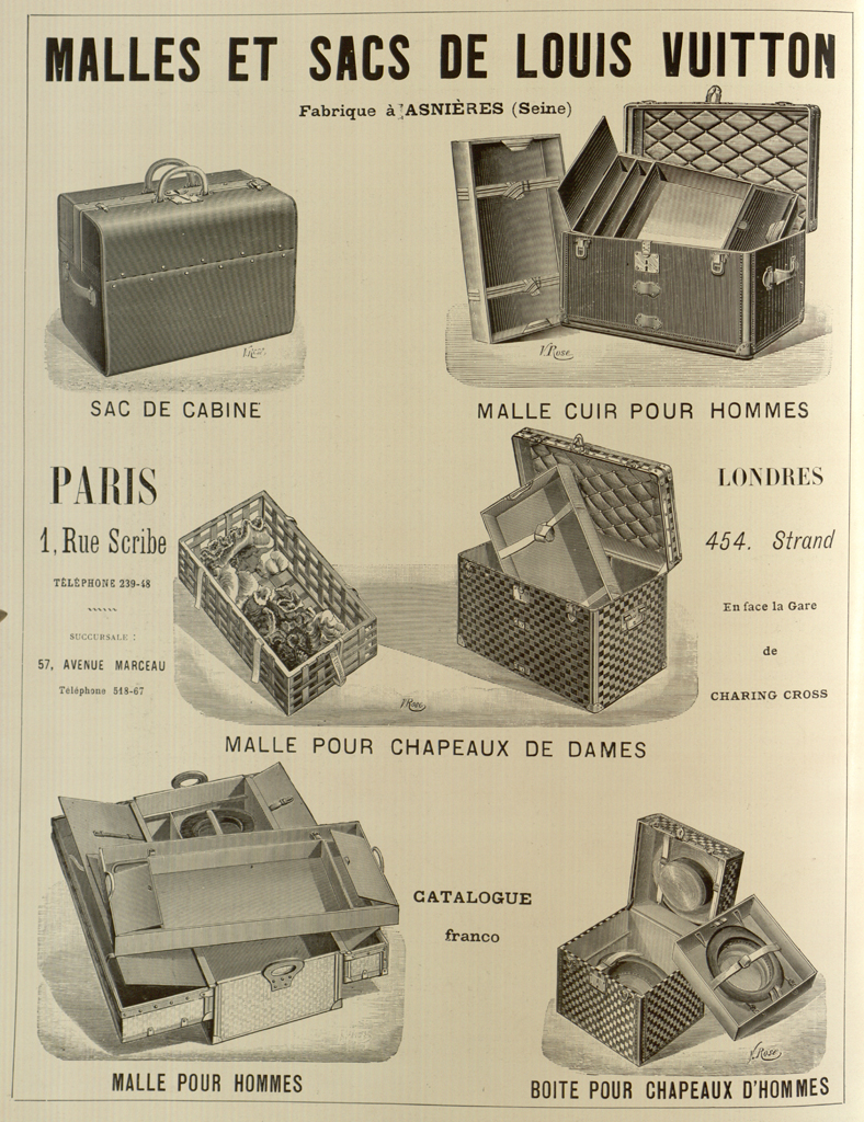 From: Le Théatre (Juillet 1898), inside front cover. [ Digital Library permanent link ]